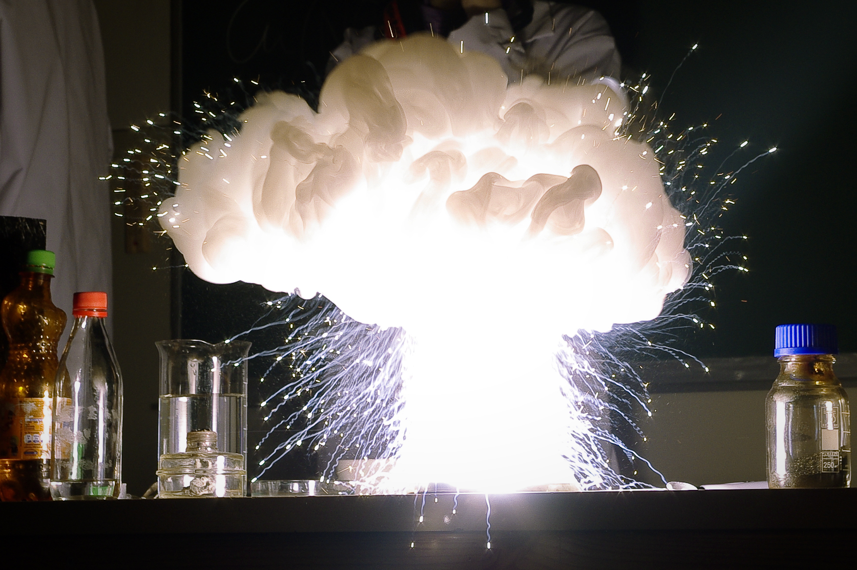 Tugev eksotermiline reaktsioon